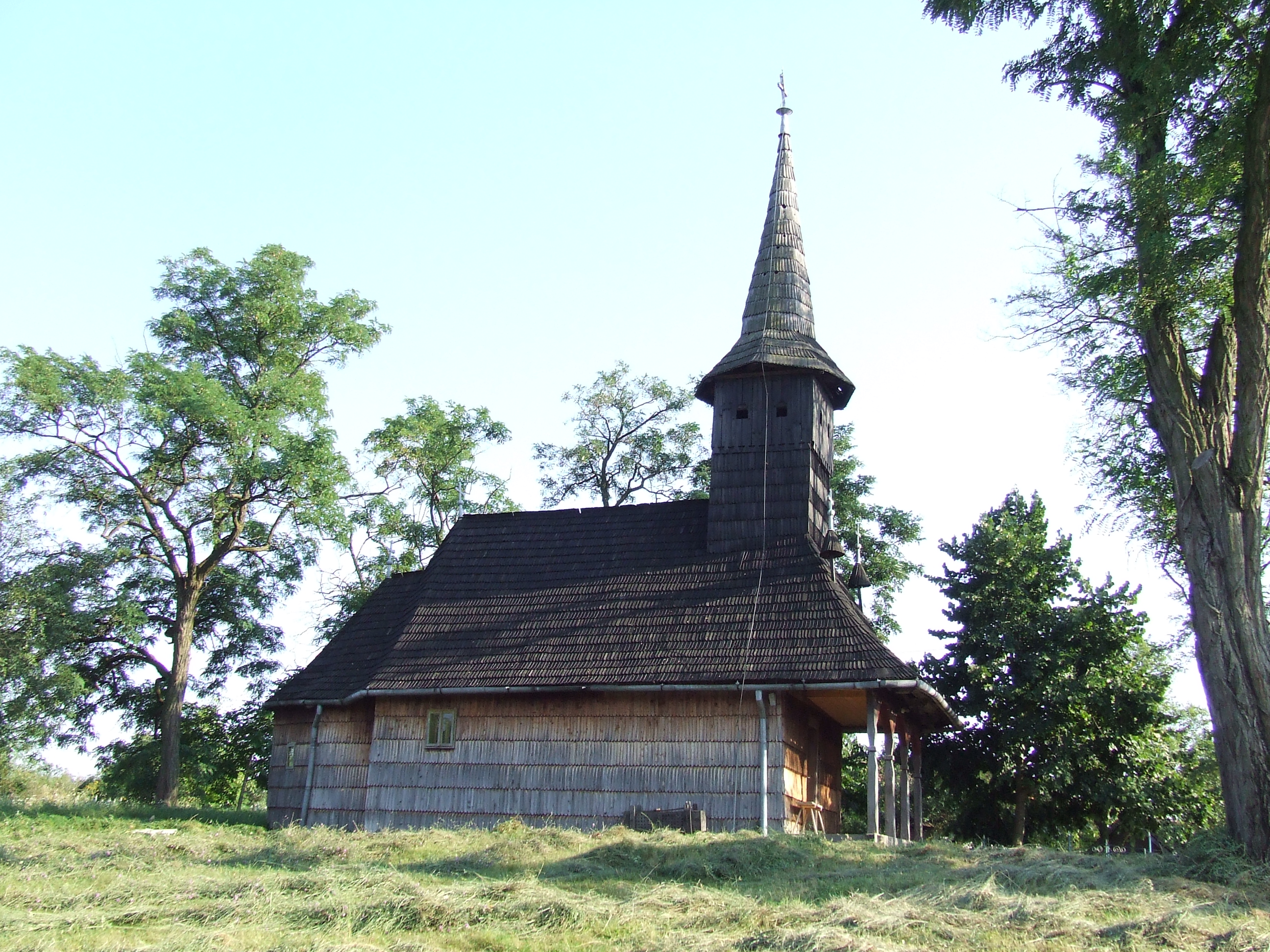 Biserica de lemn din Bolda, judeţul Satu Mare. Vedere de ansamblu din nord.